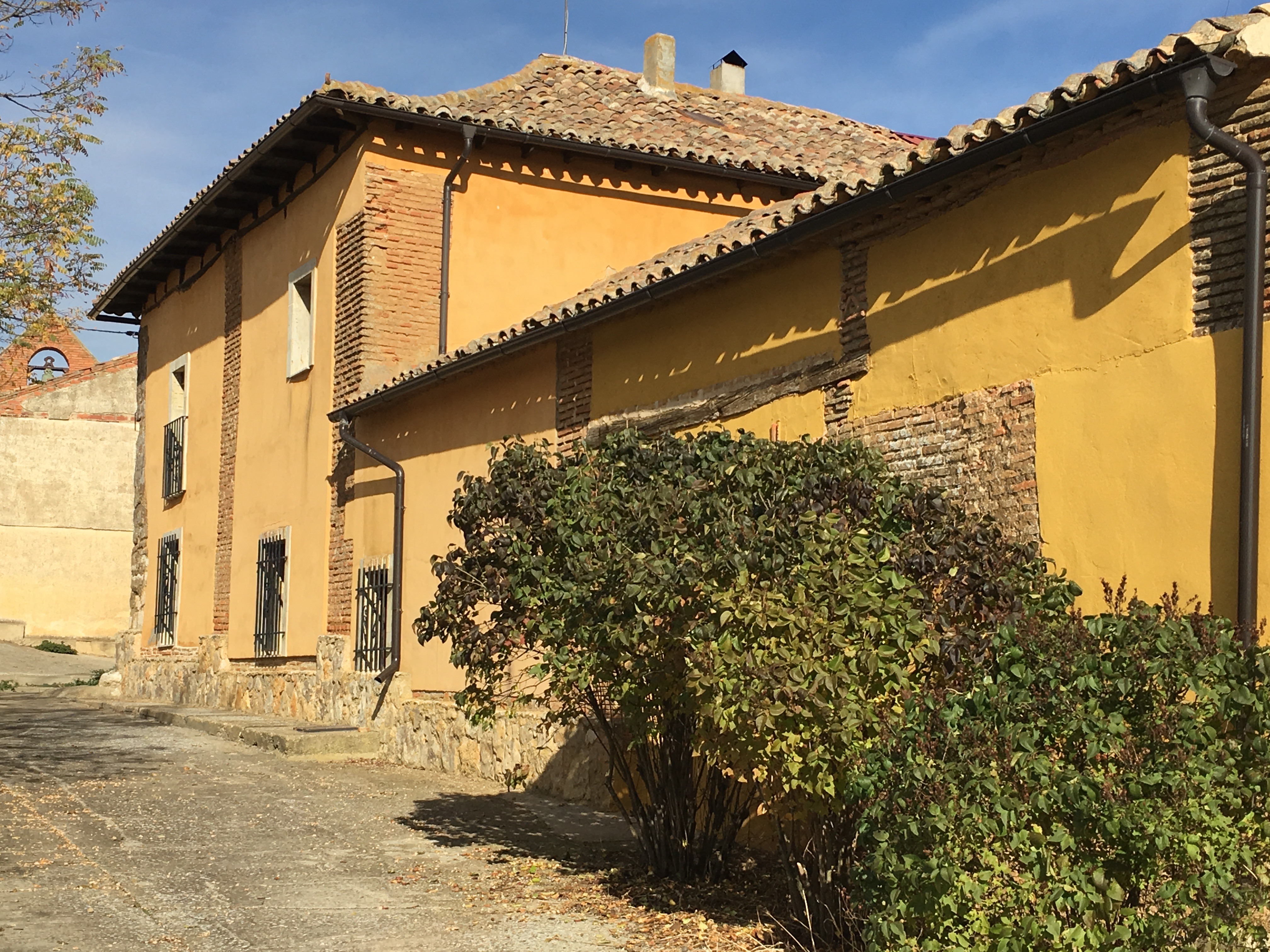 Villaesper Milenario